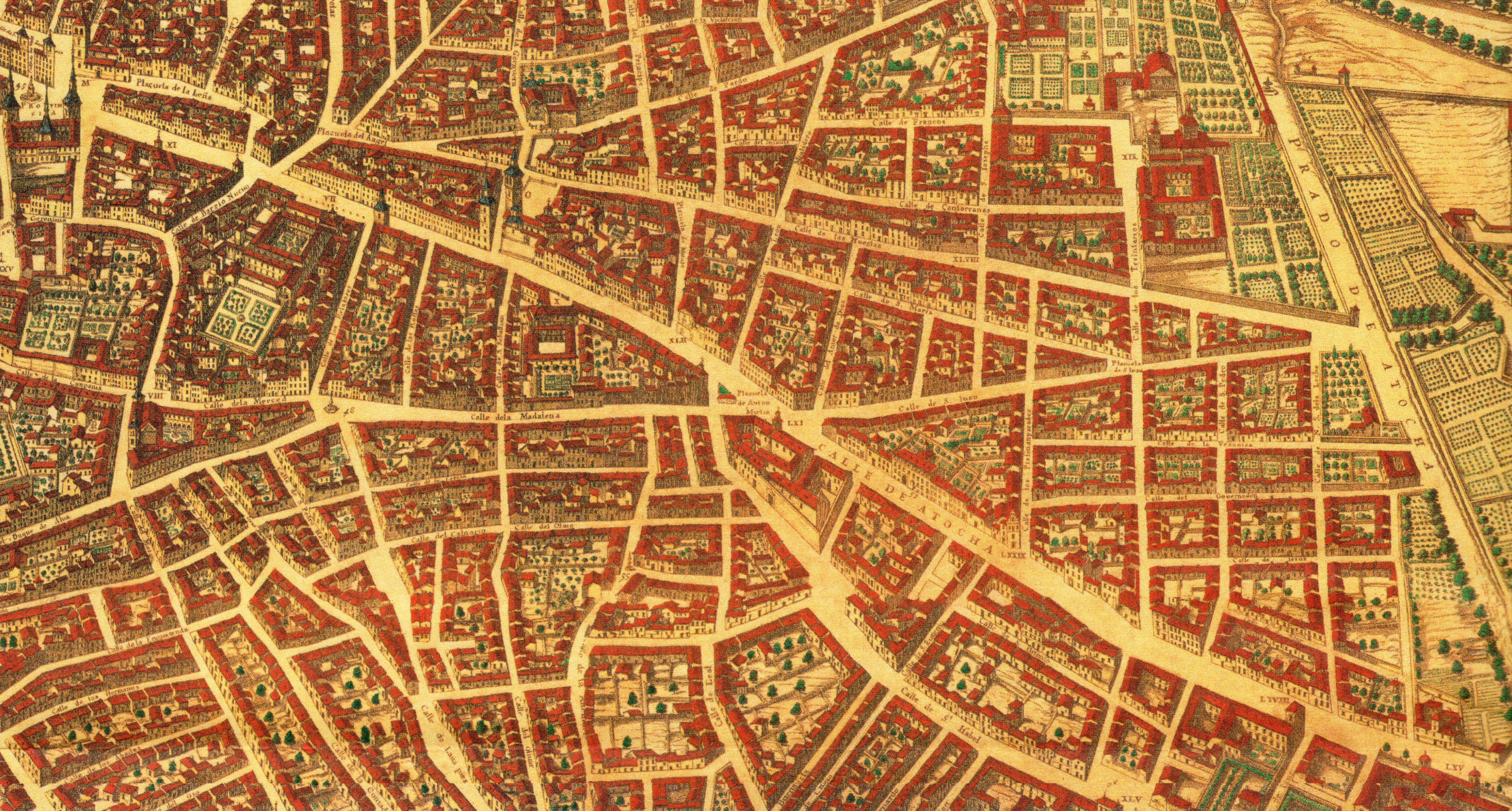 Topografía de la Villa de Madrid descrita por Don Pedro Texeira en 1656, en la cual se demuestran todas las calles al largo y ancho de cada una de ellas, las rinconadas y lo que tuercen las Plazas, fuentes, jardines y huertas con la disposición que tienen las parroquias, Monasterios y Hospitales están señalados sus nombres con letras y números que se hallaran en la tabla y los demás edificios, torres y delanteras de las casas de la parte que mira al Mediodía están sacadas al natural que se podrán tocar las puertas y ventanas de cada una de ellas.